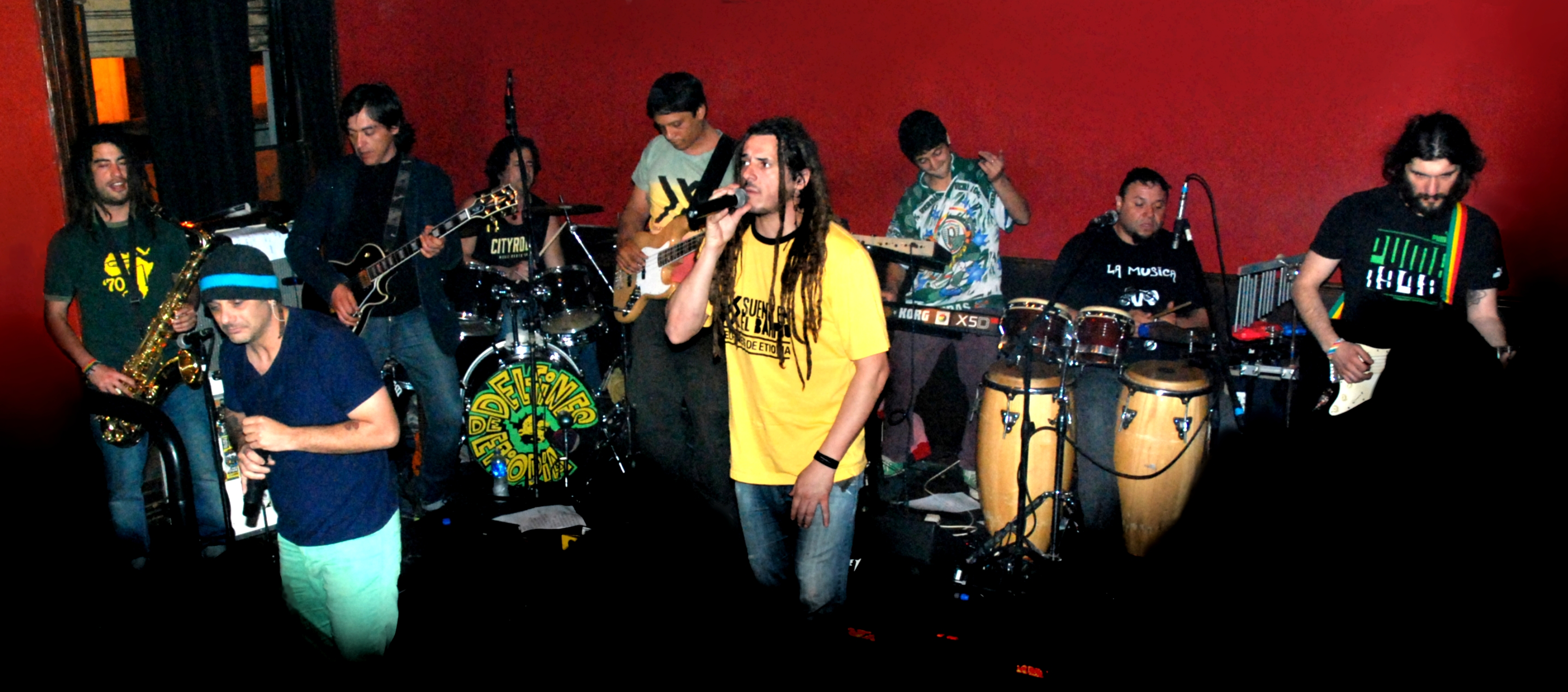 Delfines de Etiopía en Rey Lagarto Bar, La Plata.